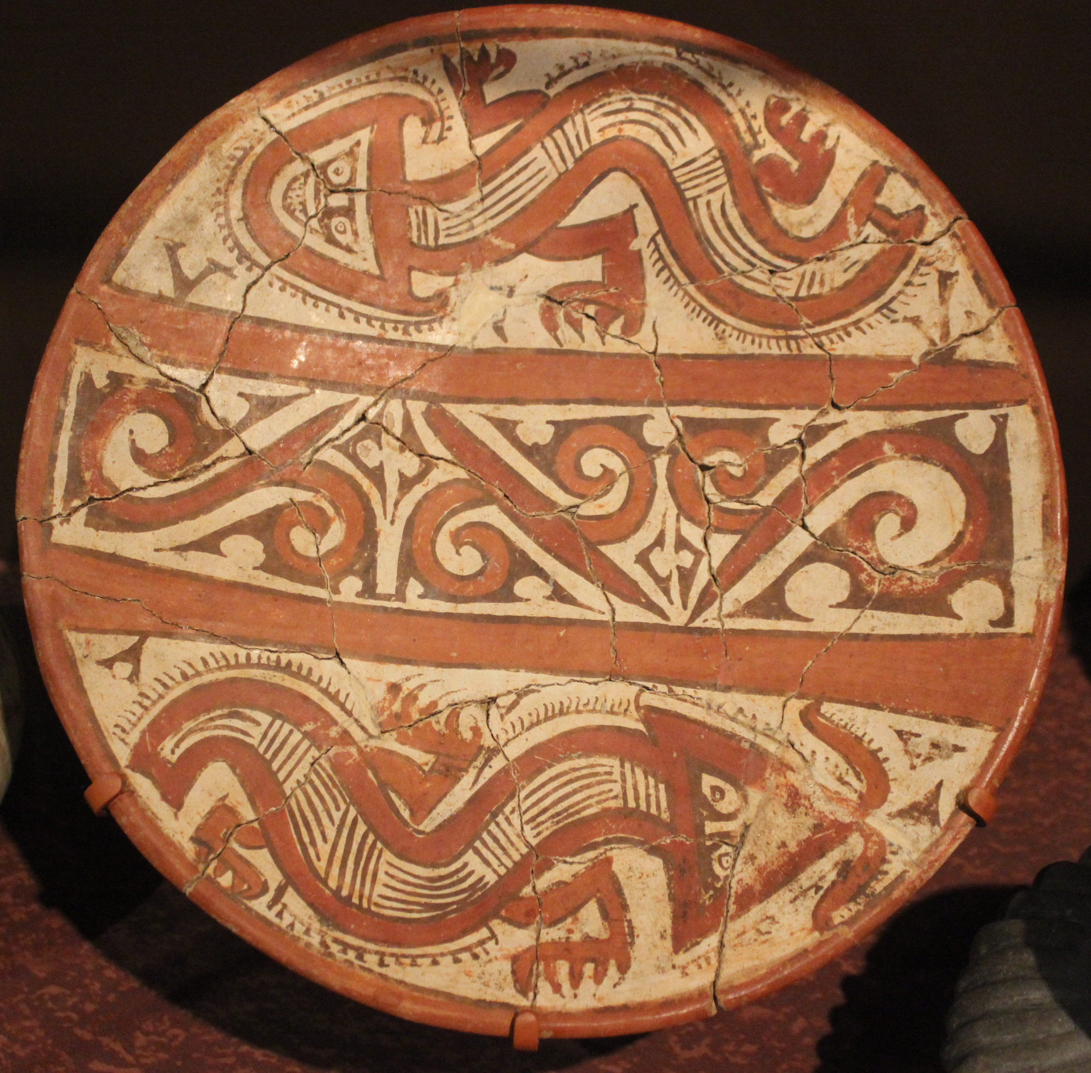 Penn University Museum. Tesoro de Sitio Coclé (Panamá).